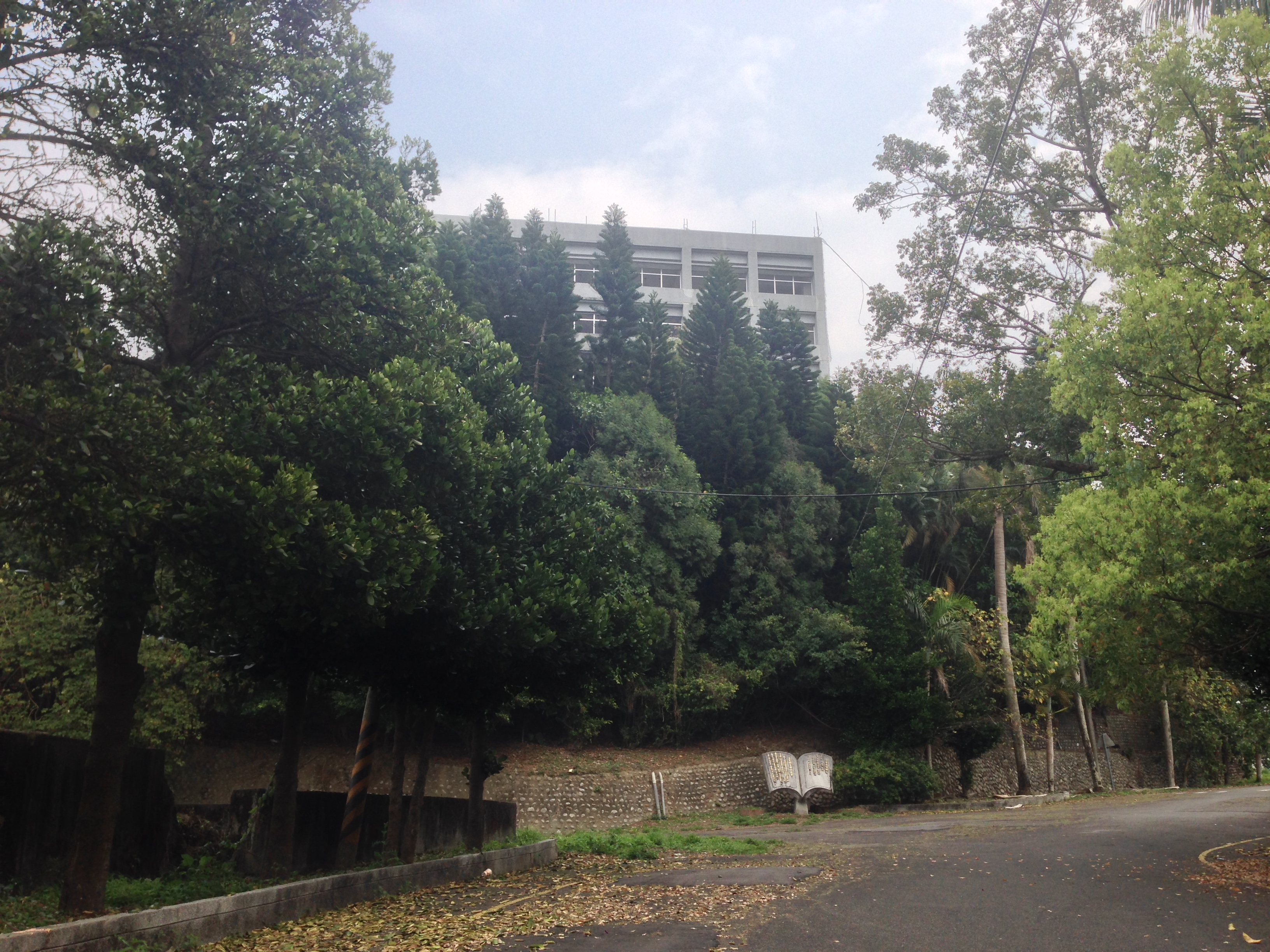 舊東勢高工